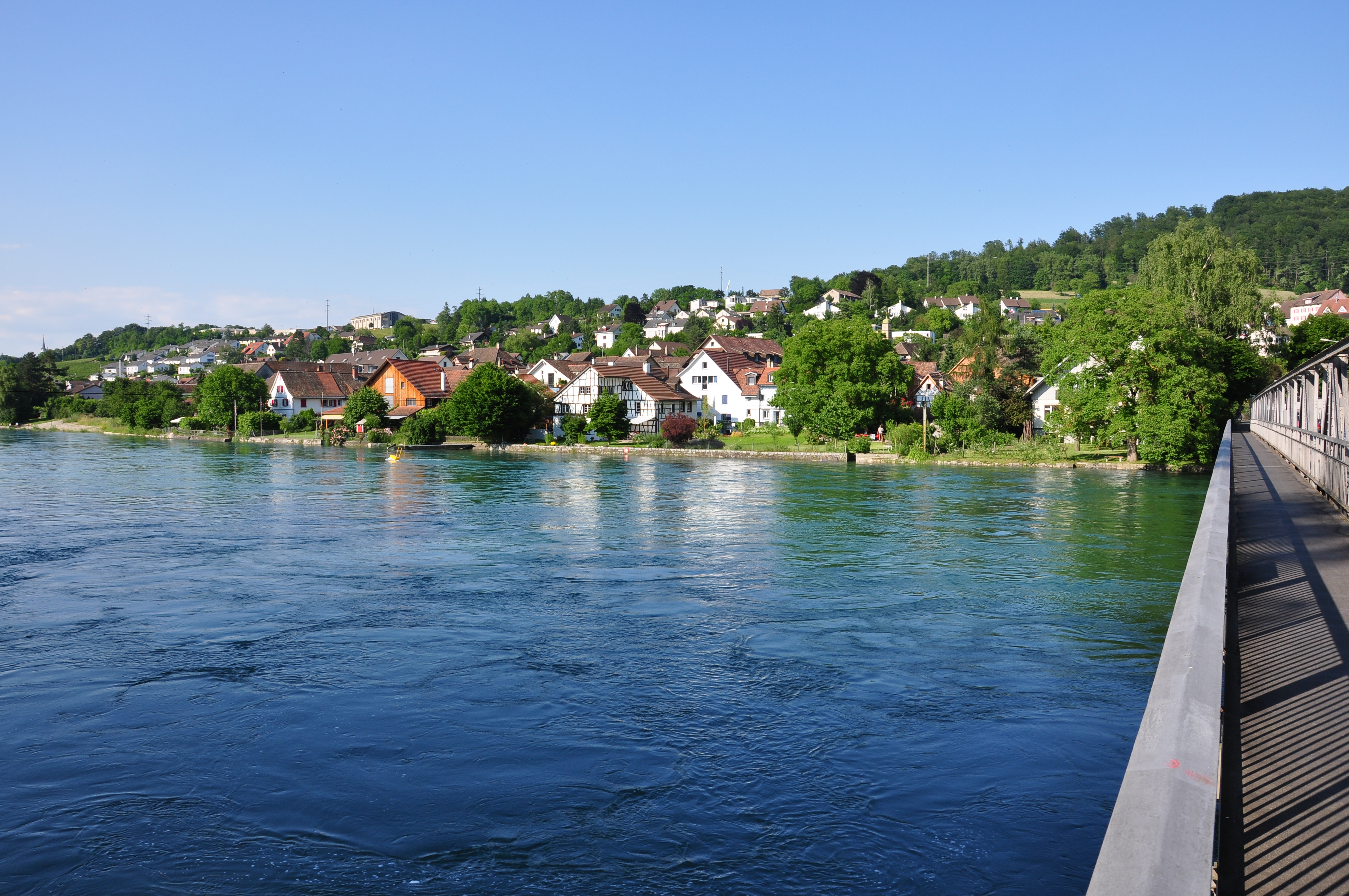 Flurlingen (Switzerland), as seen from Neuhausen am Rheinfall, Rhine in the foreground.